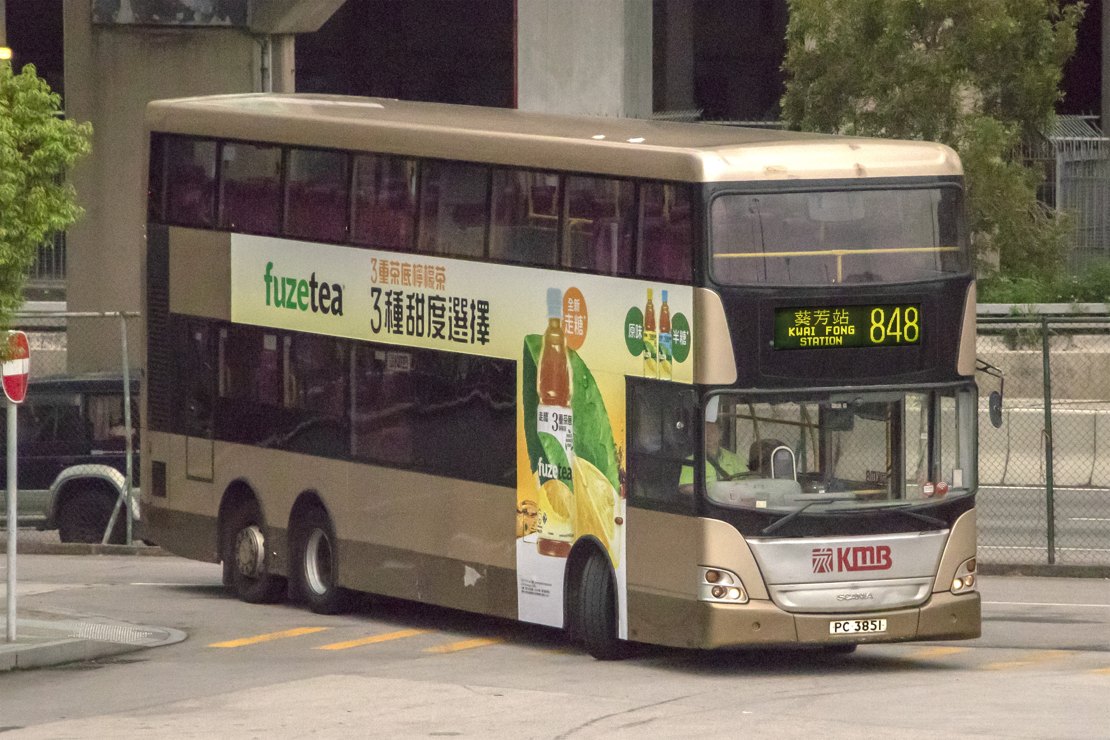 中文（香港）: 九巴斯堪尼亞K310UD行走848線 中文（新加坡）: 九巴斯堪尼亚K310UD行走848缐